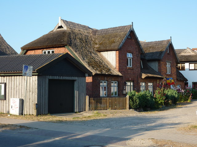 Haus in Althagen